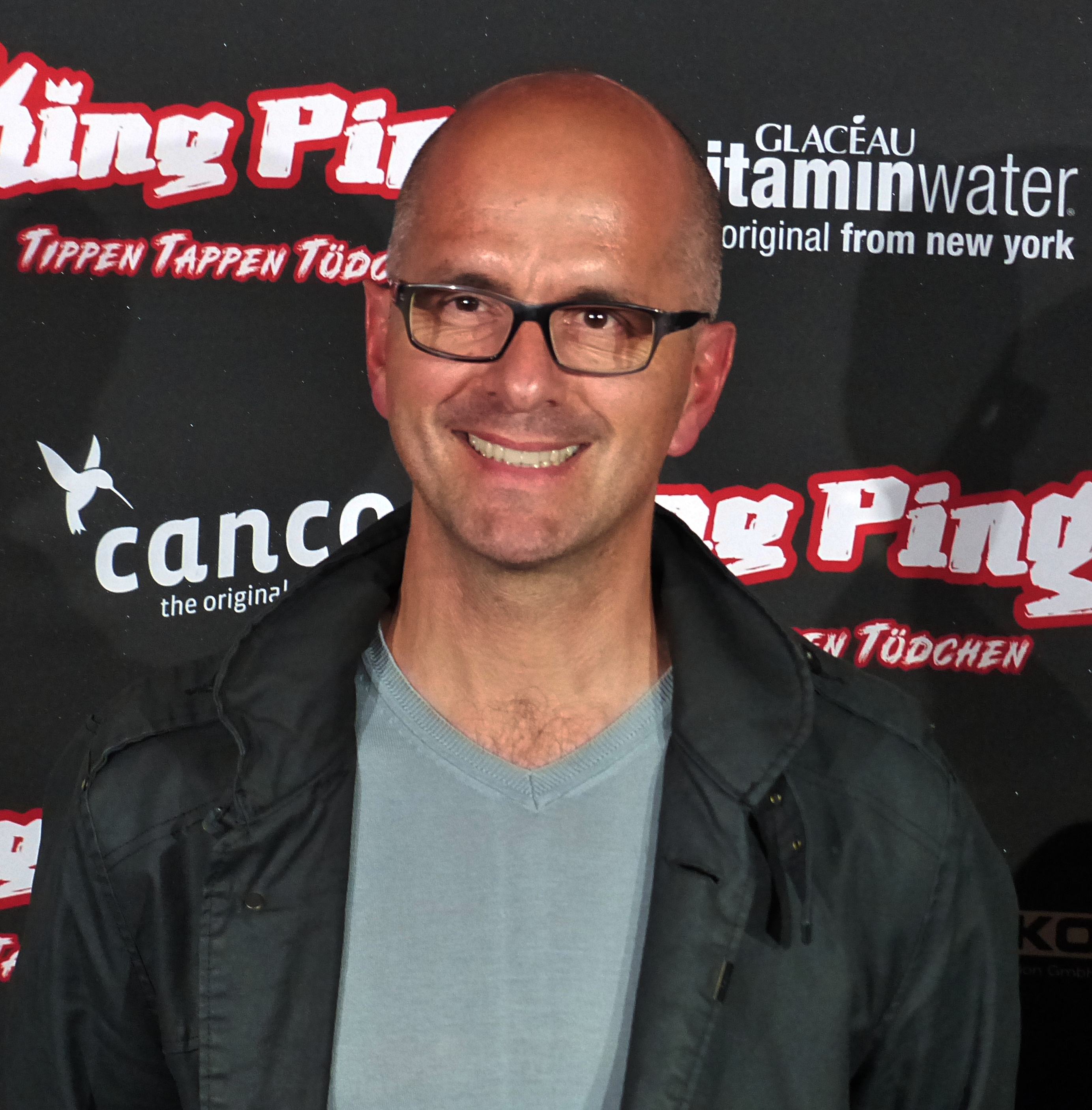 Christoph Maria Herbst bei der Deutschlandpremiere von "King Ping", in Wuppertal.